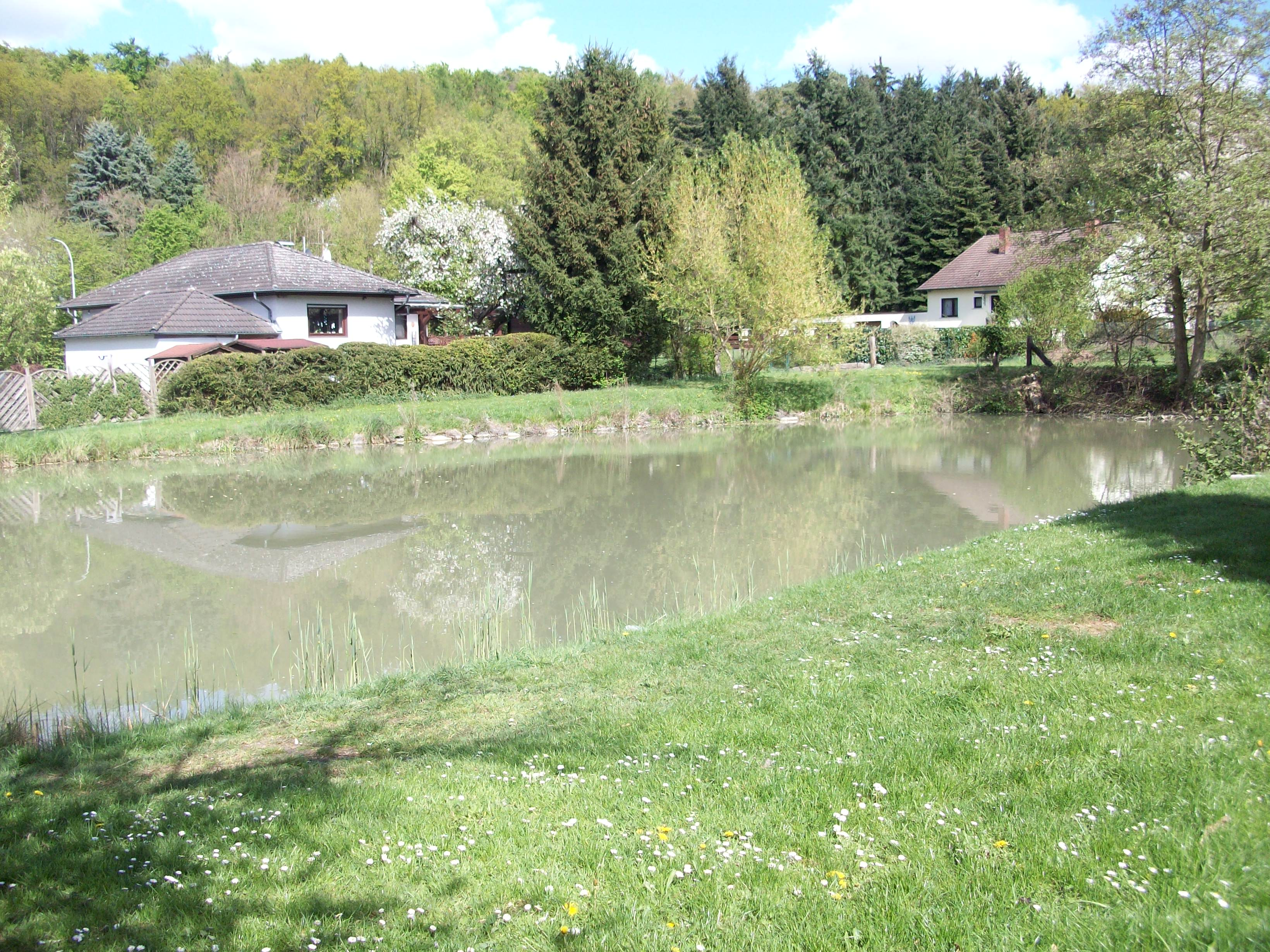 Lage der ehemaligen Wasserburg Bisses, Südostblick